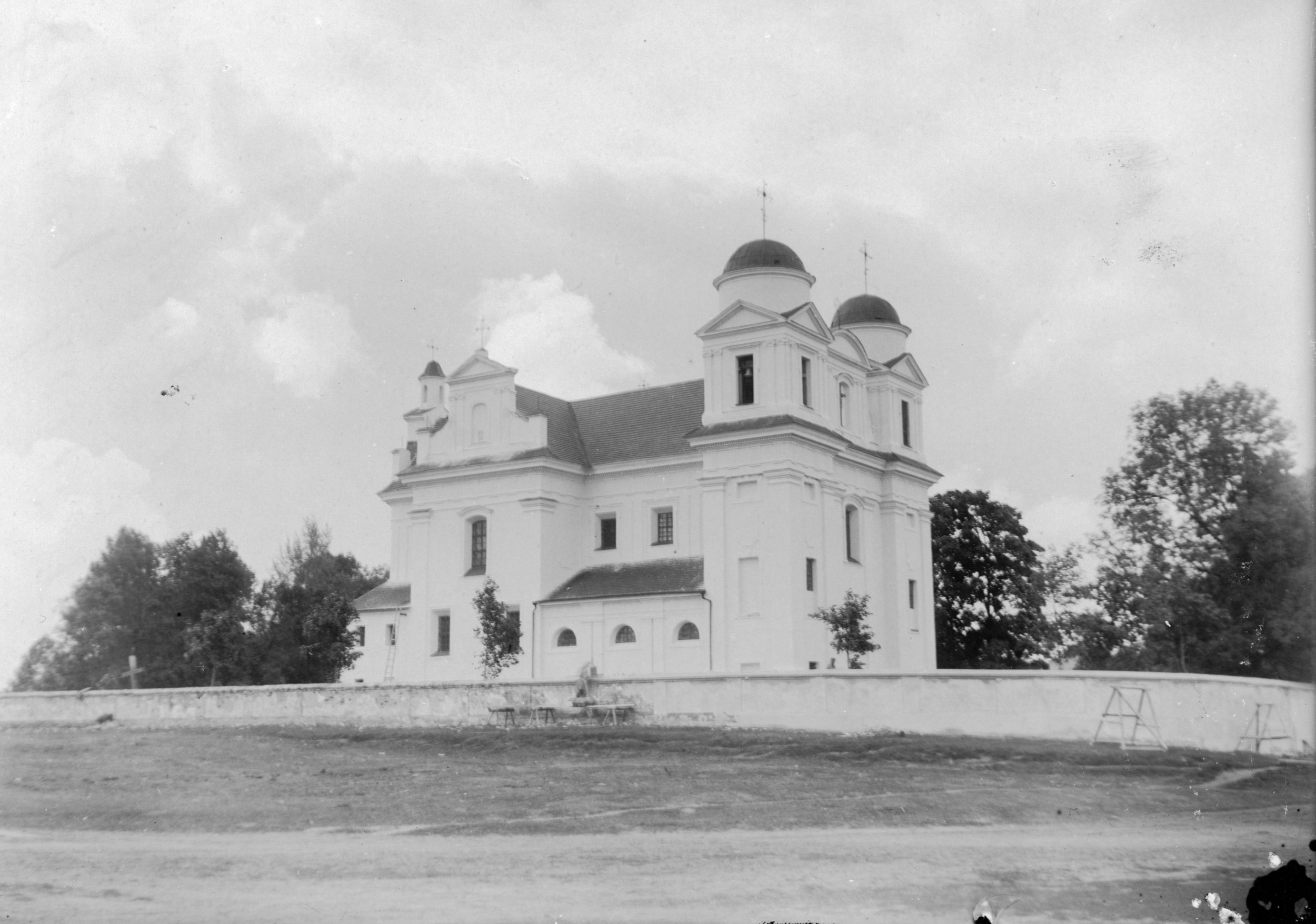 Беларуская (тарашкевіца): Лучай (Łučaj). Касьцёл Сьвятога Тадэвуша ордэна езуітаў